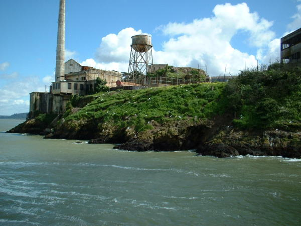 Alcatraz